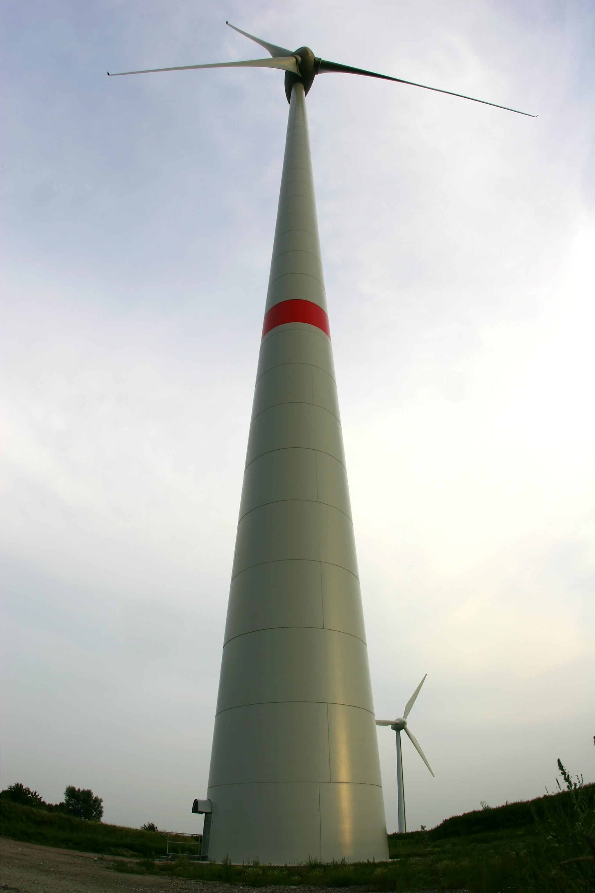 Windenergieanlage E-66 des Herstellers Enercon im Windpark Wybelsumer Polder in Emden